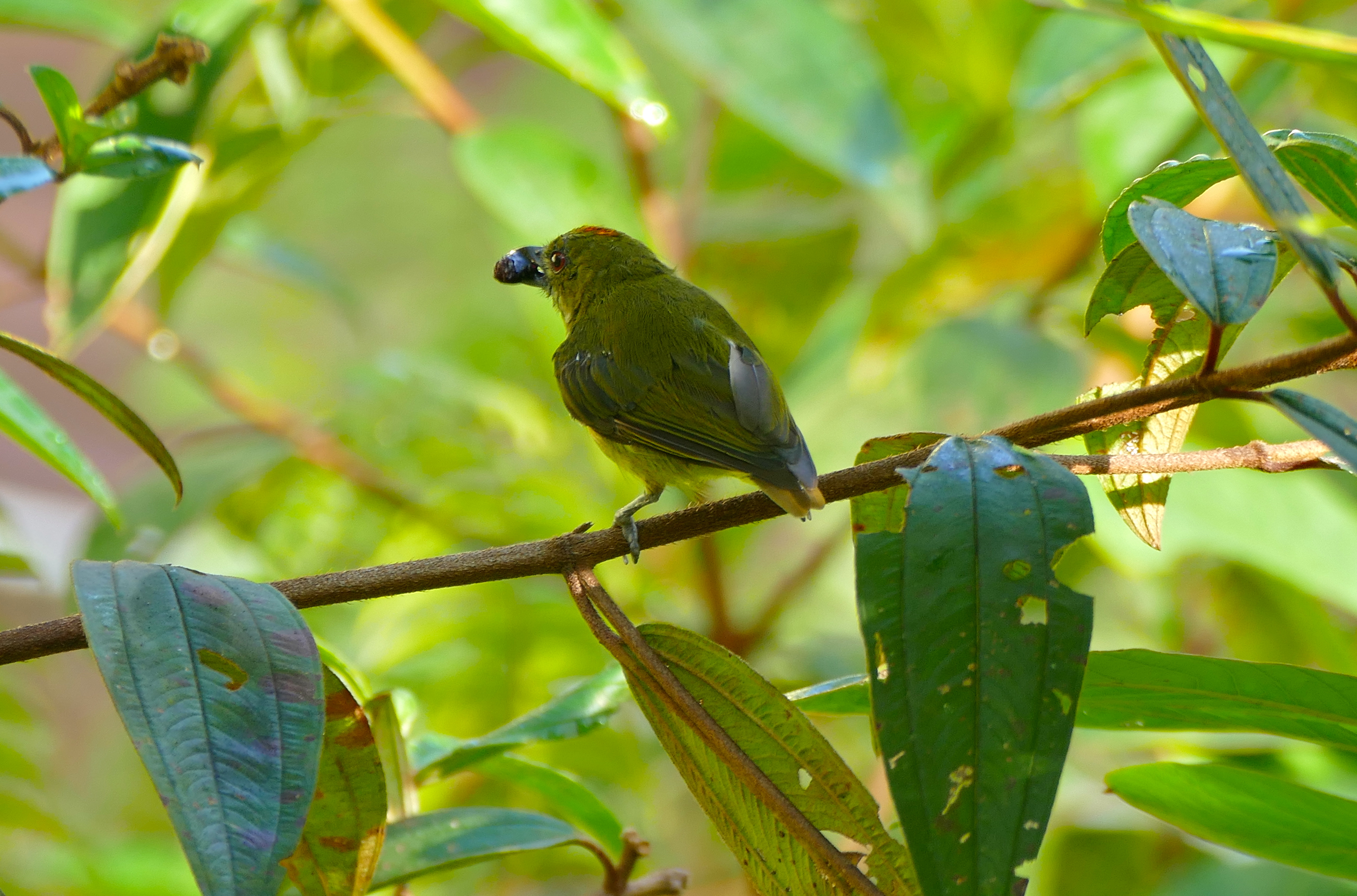 Headquarters, Mulu NP, Sarawak, MALAYSIA